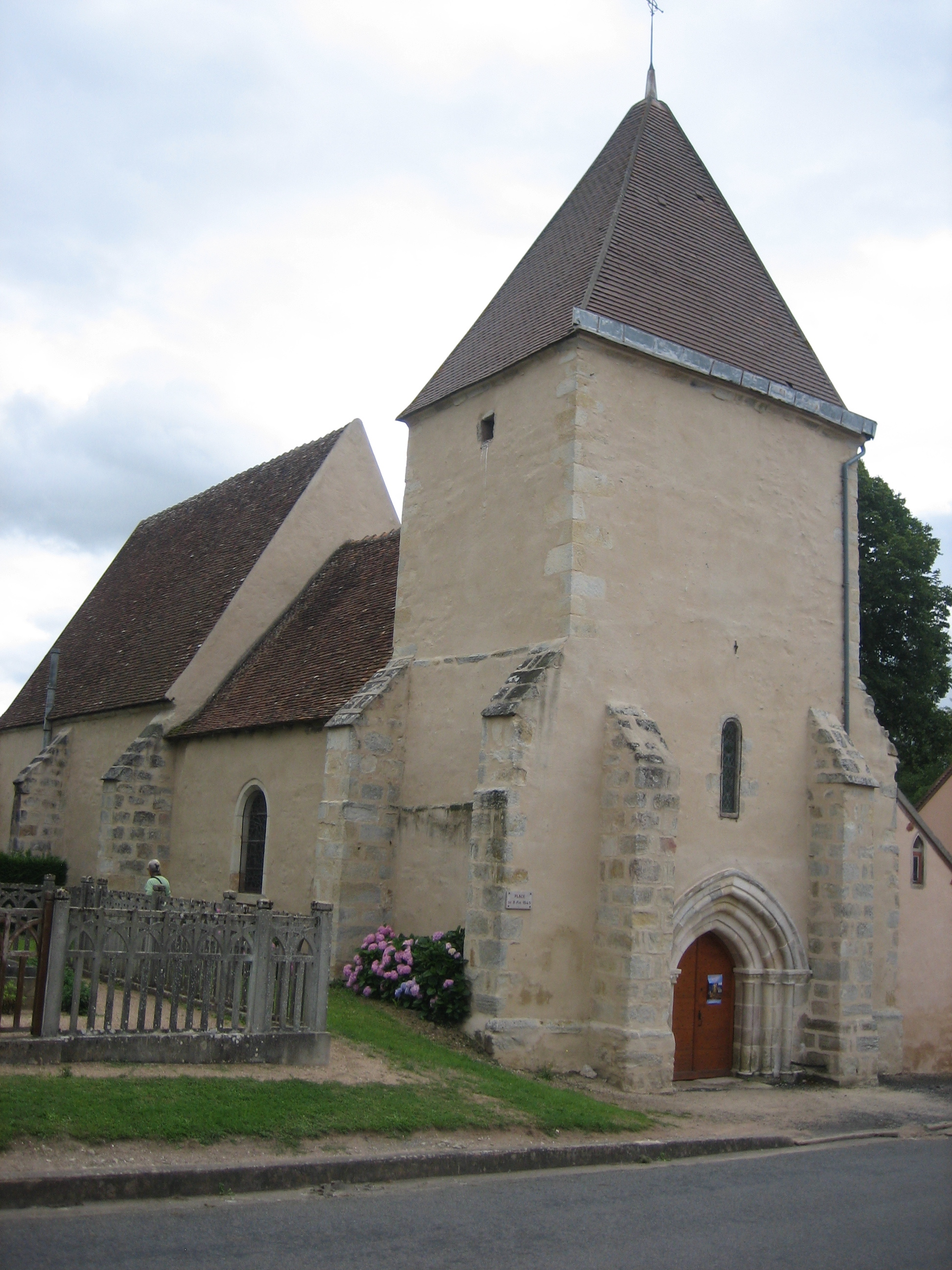 Eglise Saint-Maur à Saint-Maur (Cher)